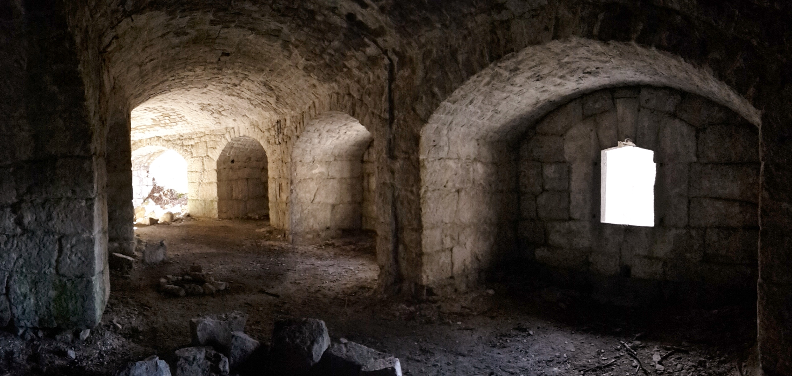 Forte Brusafer